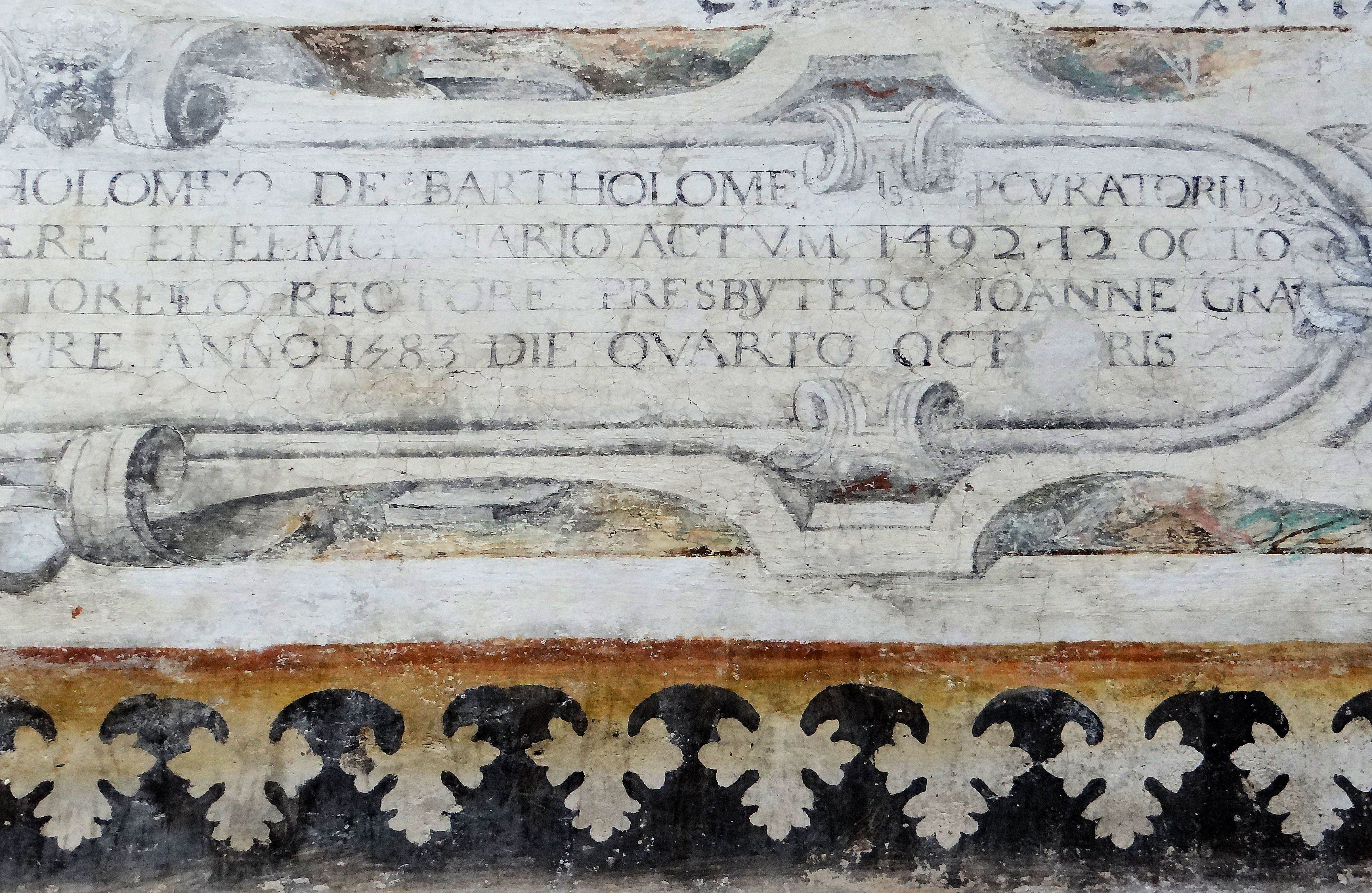 La Brigue - Chapelle Notre-Dame-des-Fontaines - Fresques de la Passion du Christ - Dédicace